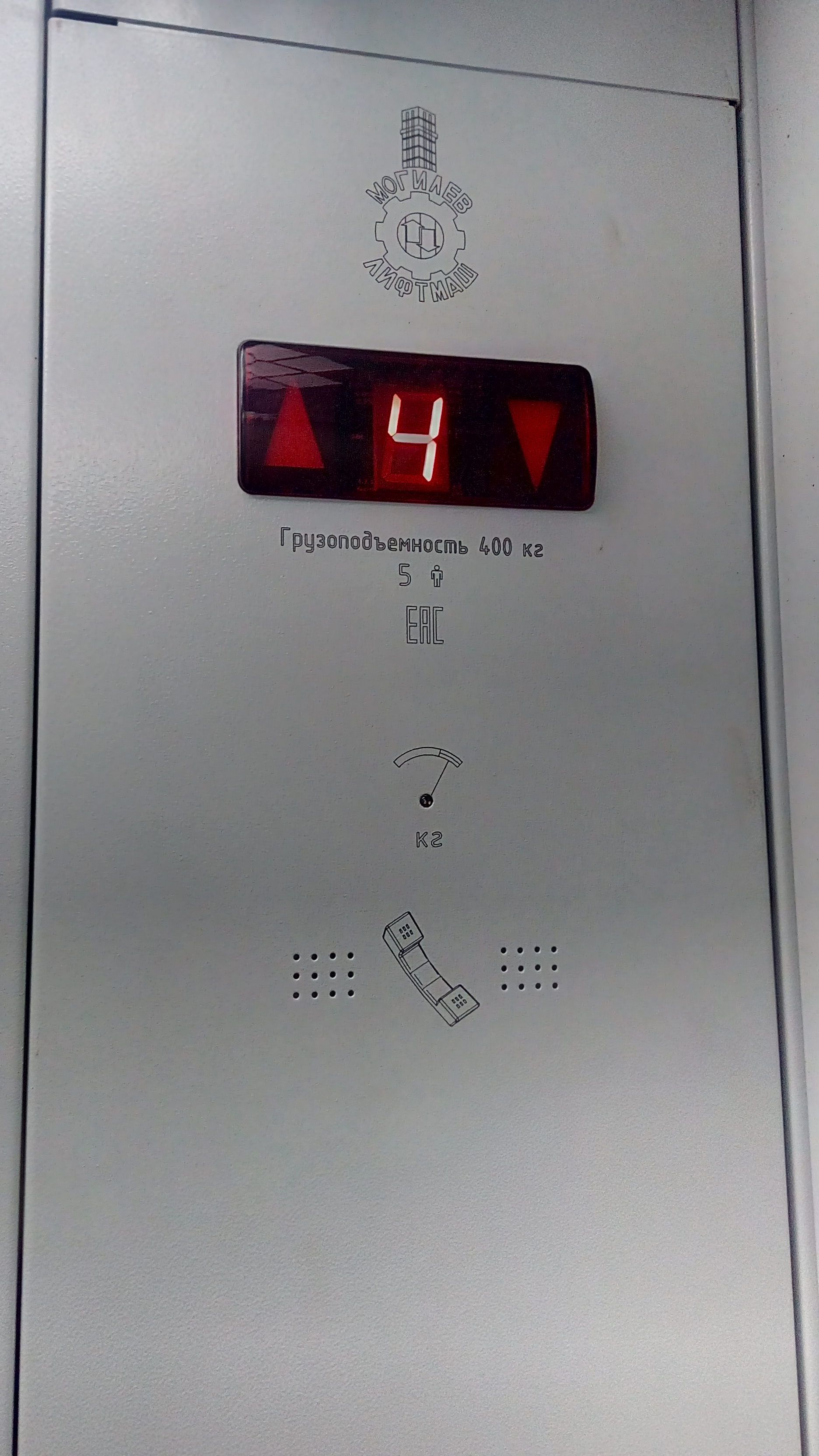 Sumqayıtda, 10-cu mikrorayonda 2018-ci ildə quraşdırılmış lift